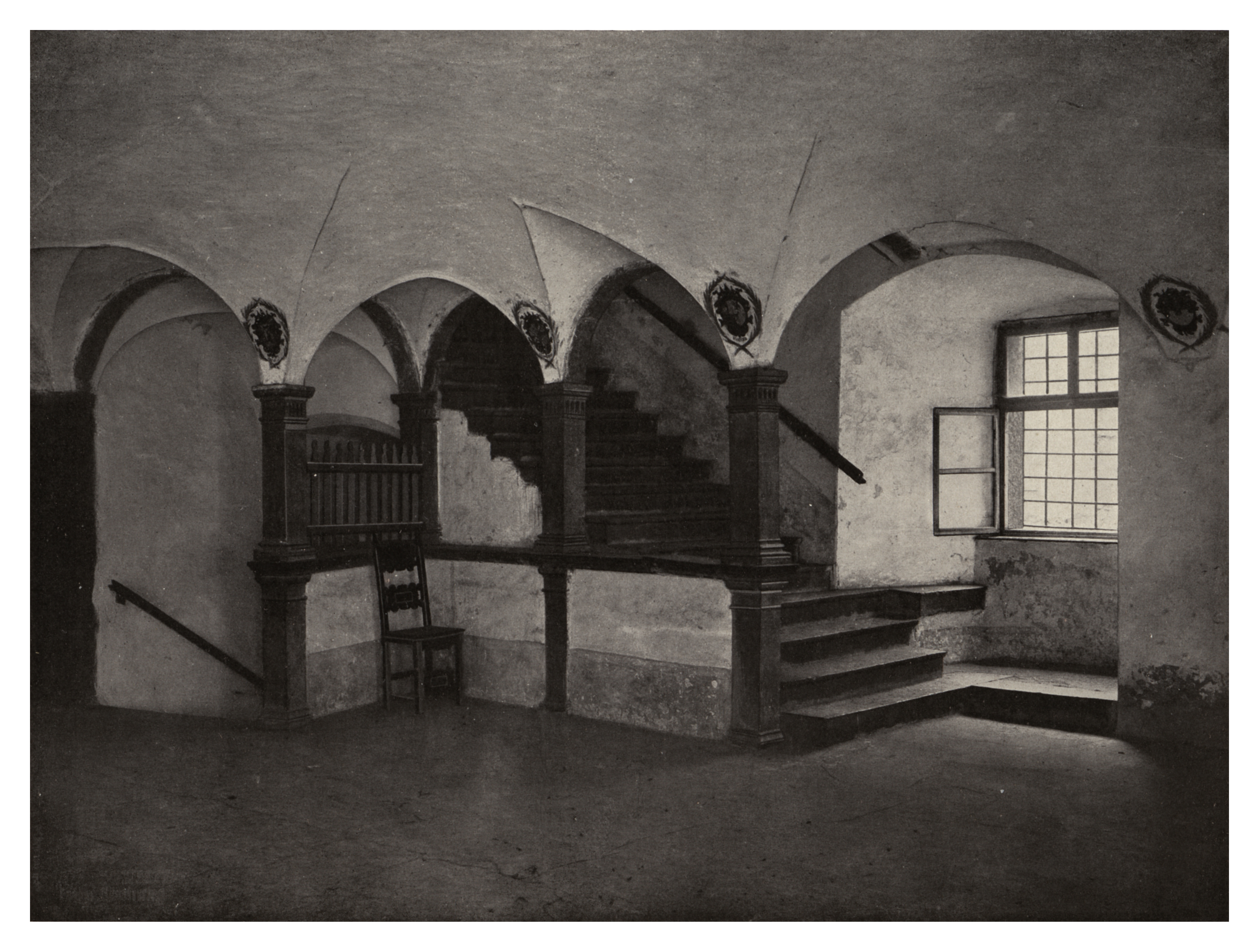 Baer, C. H. - Deutsche Wohn- und Festräume aus sechs Jahrhunderten Band 6 Verlag von Julius Hoffmann, Stuttgart 1912